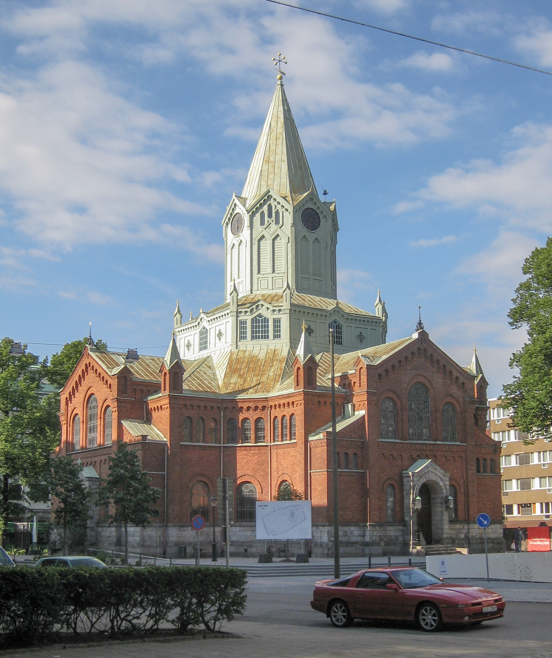 Caroli kyrka i Malmö, numera avkristnad